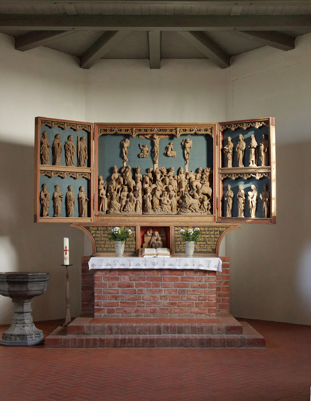 St. Vinzenz in Odenbüll, die einzige Kirche auf der heutigen Insel Nordstrand, die die Burchardiflut oder Zweite Grote Mandränke 1634 überstand. Chor mit spätgotischem dreiflügeligen Schnitzaltar